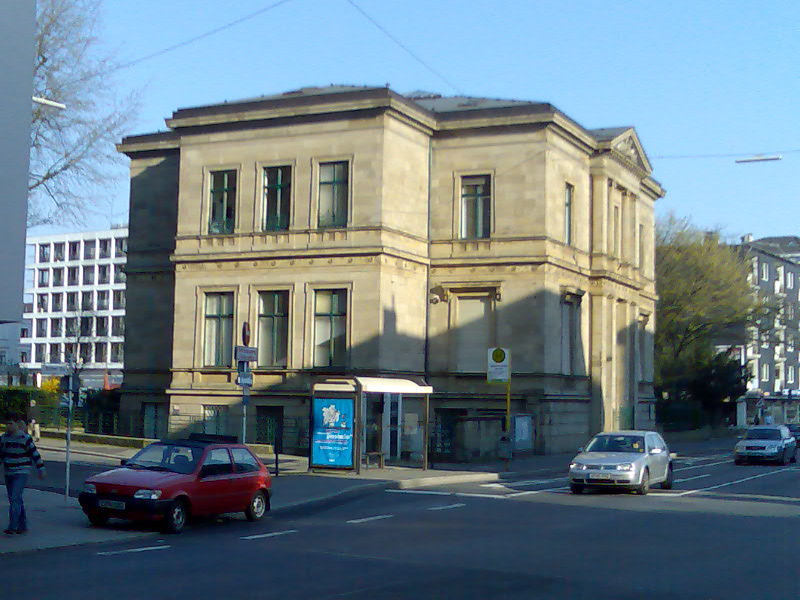 Villa Frowein, ehemals Bergische Musikschule (Wuppertal)